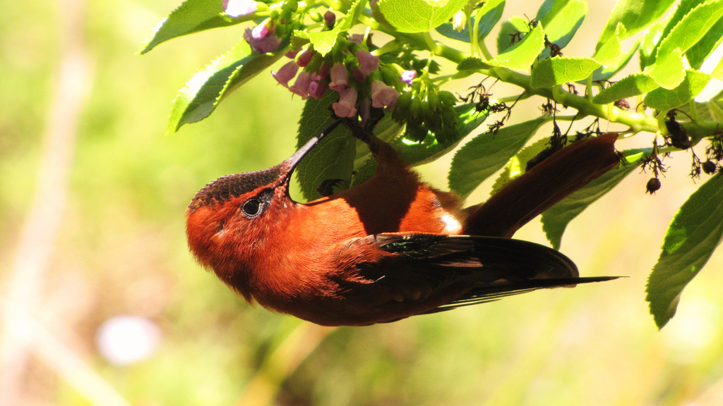 Picaflor de Juan Fernández libando en una Cuminia eriantha.